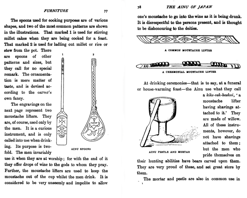 Dictionnaire de John Batchelor (1854-1944), The Ainu of Japan, 1892 ː vaisselle.